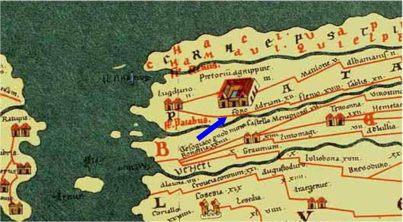 Forum Hadriani, Romeinse stad in Nederland. Detail van de Peutinger Kaart. Een middeleeuwse kopie van een Romeinse landkaart uit de 3e of 4e eeuw.